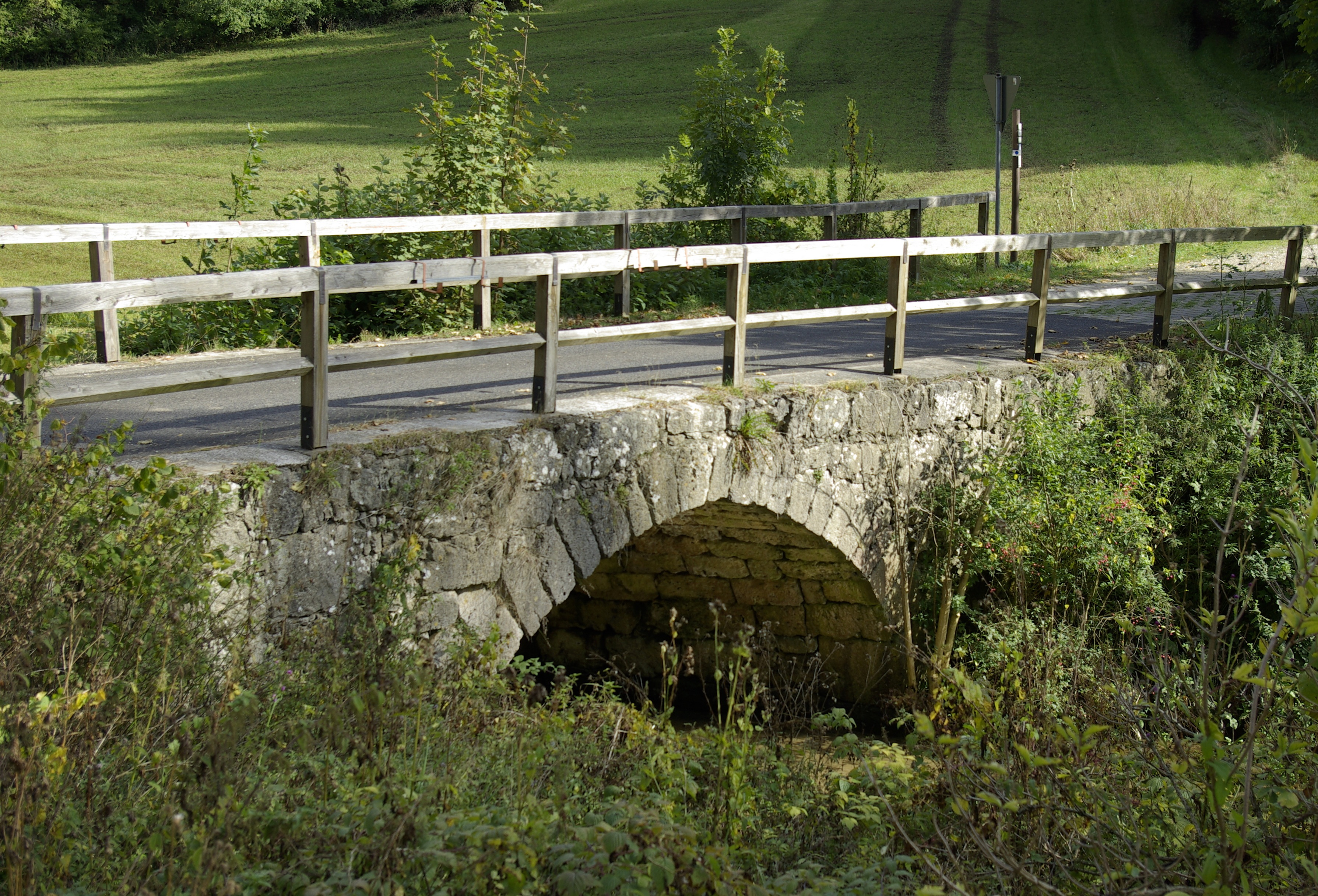 Die sogenannte Römerbrücke in der Gemeinde Obertrubach in der Fränkischen Schweiz.